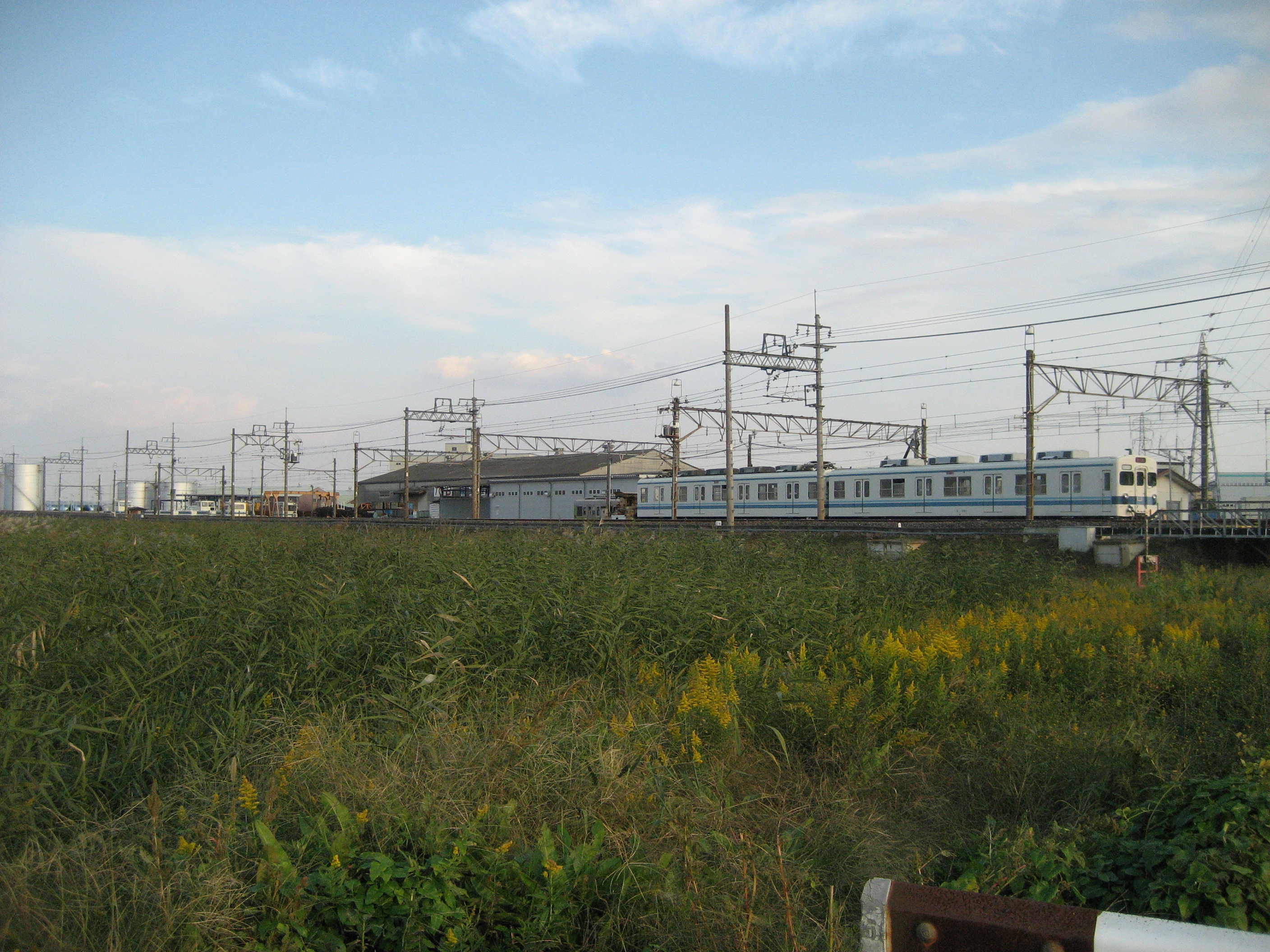 館林荷扱所と東武5000系